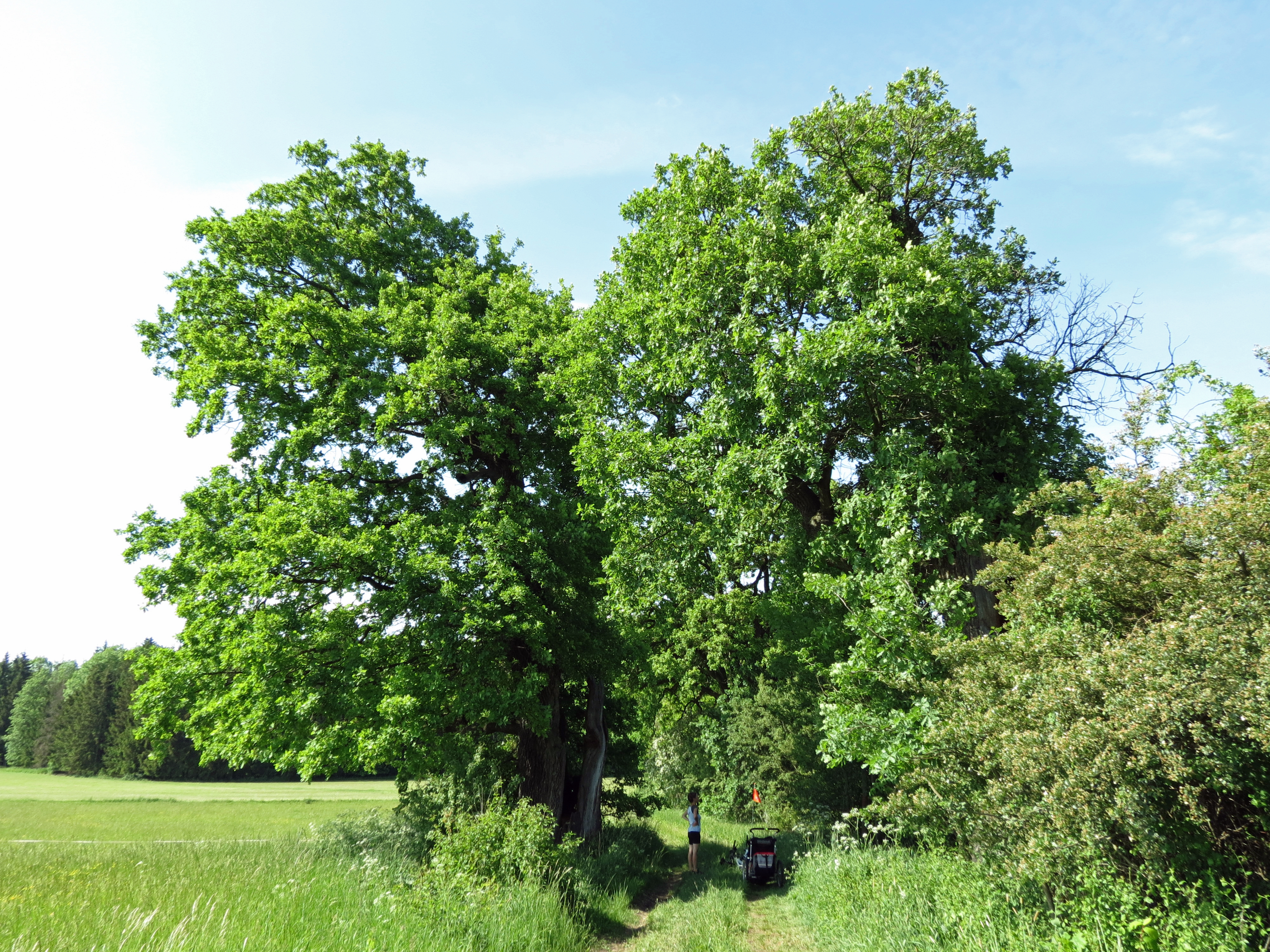 Žižkovy duby v Miletíně